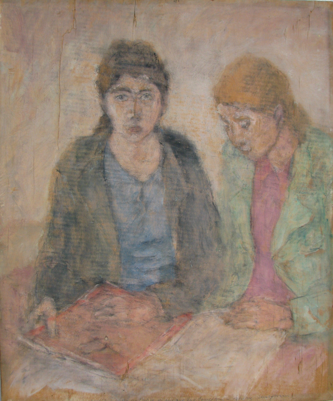 Ragazze di Burano cm. 50x61 (1939 c.) Collezione Privata